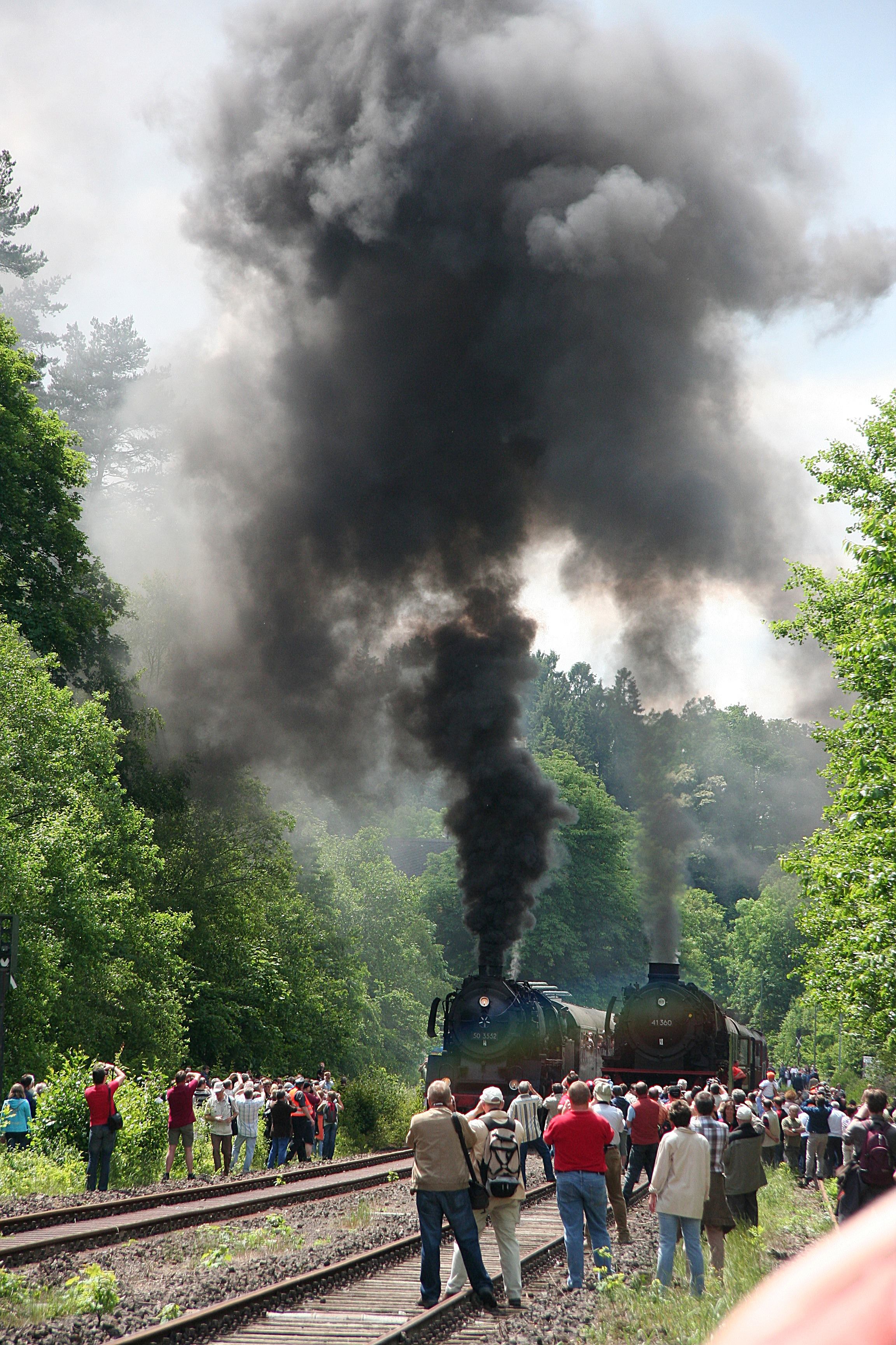 Lok 50 3552 (links) und 41 360 bei der Wiedereröffnung der Brexbachtalbahn.